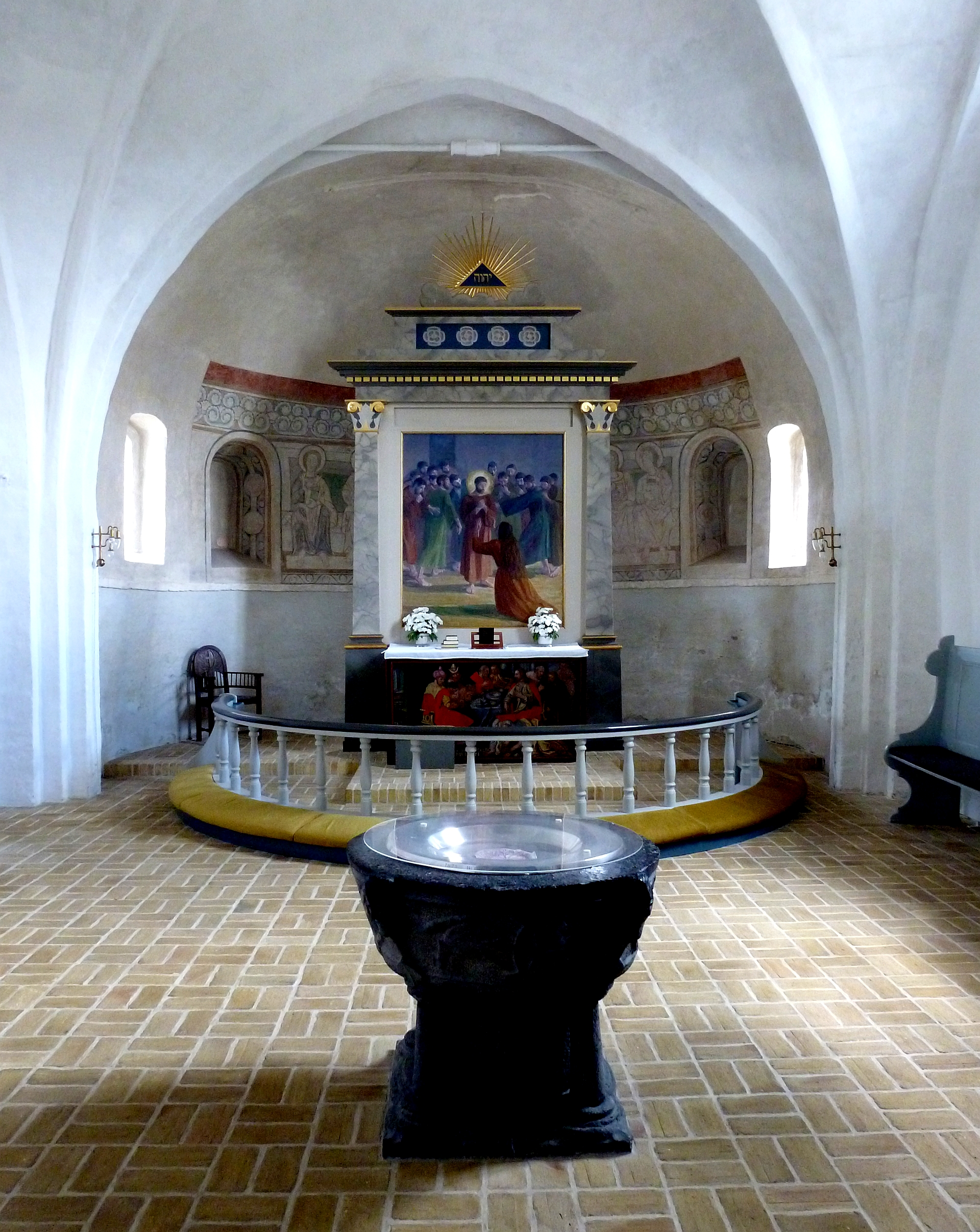 Altarraum und Taufbecken der Ballum Kirke. Aufnahmedatum 2011-05.